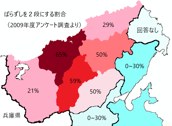 丹後ばらずしの製法において、２段にする割合を示した分布図。 白地図: 国土地理院 地理院タイル白地図(基本測量成果ではない)をベースに、京丹後市旧６町および湖沼のおおまかな位置関係を加筆した（境界等は正確ではない。）